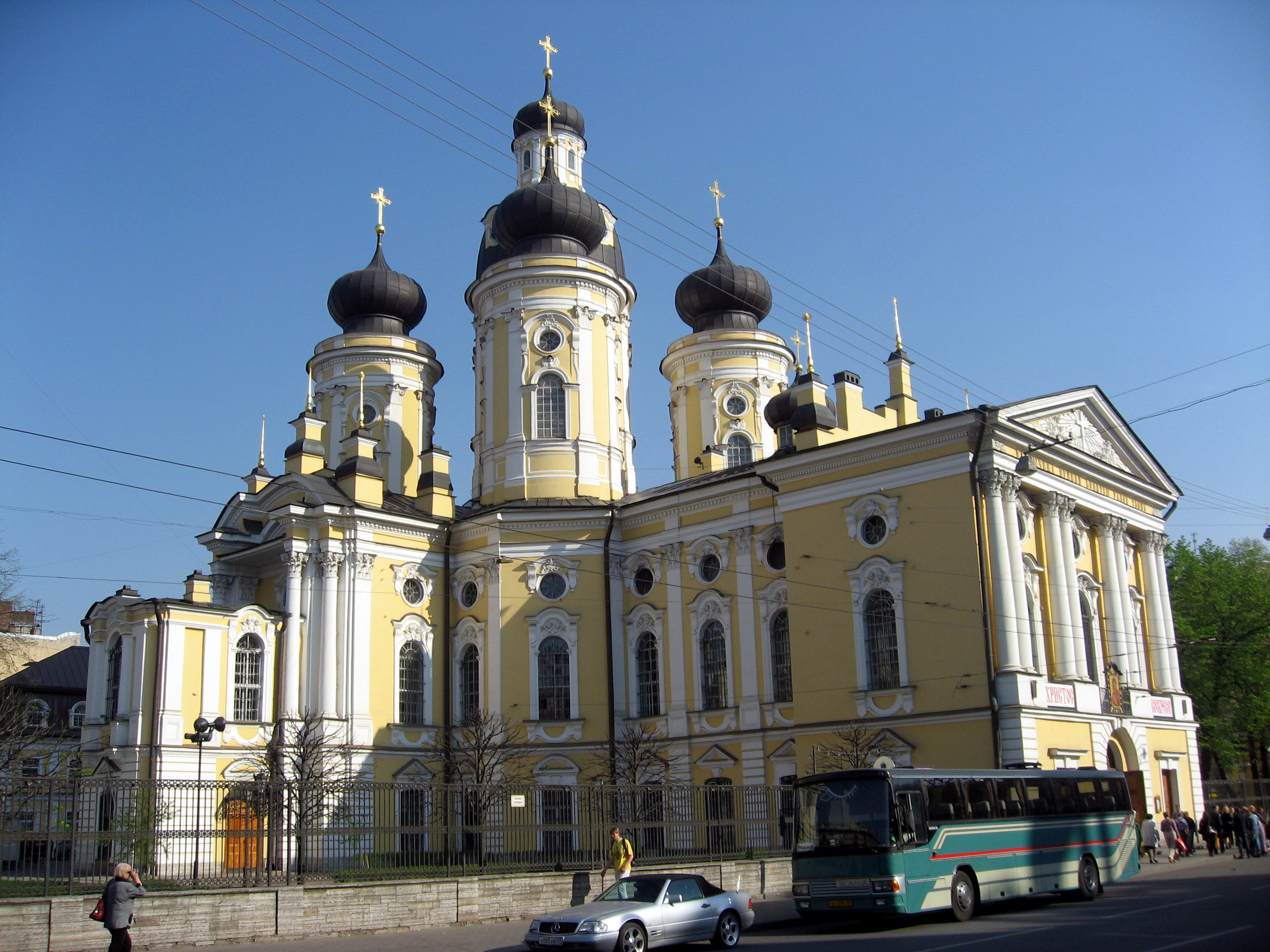 Sankt-Petěrburg